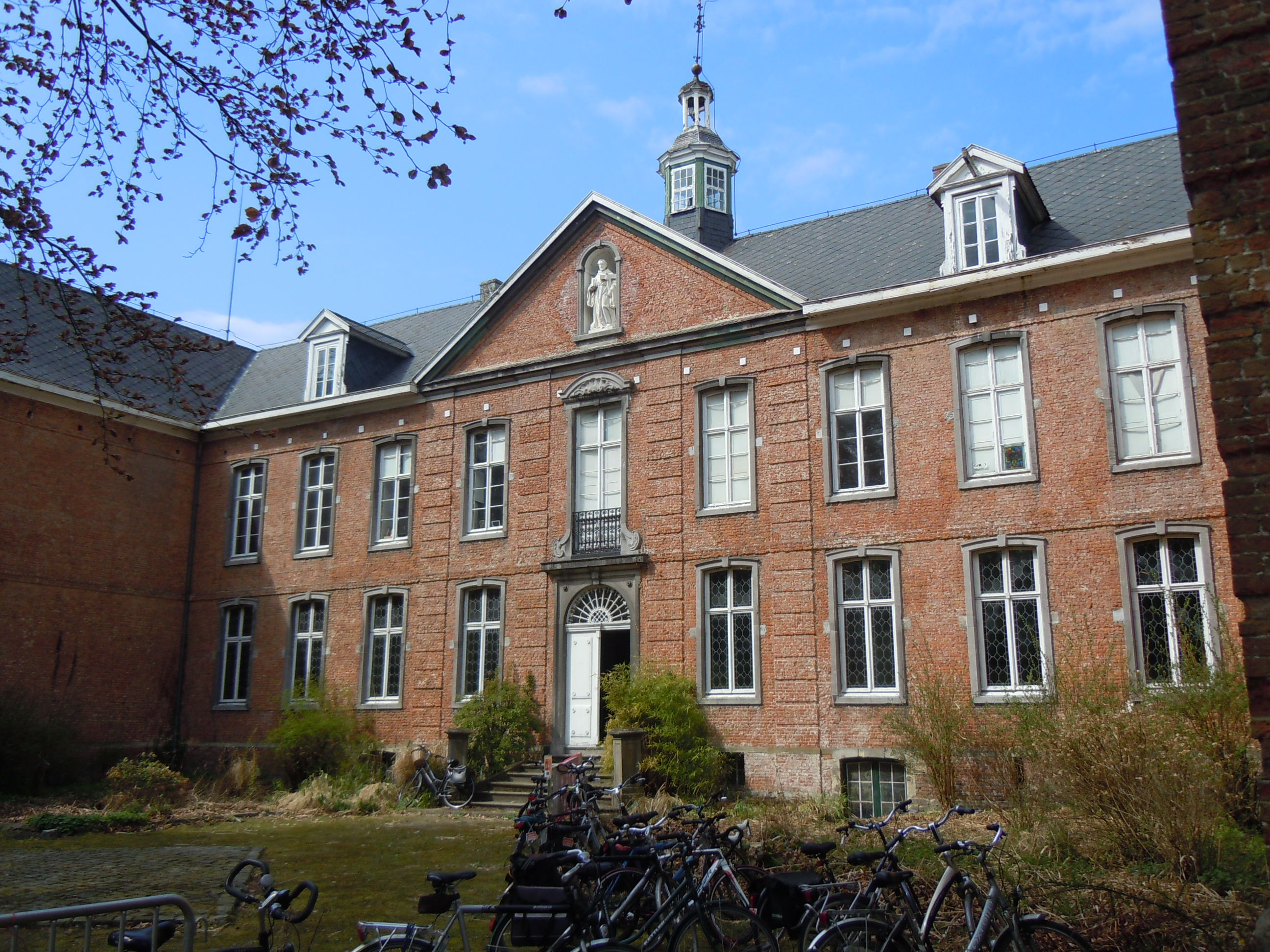 ABDIJ ST BERNARDVS